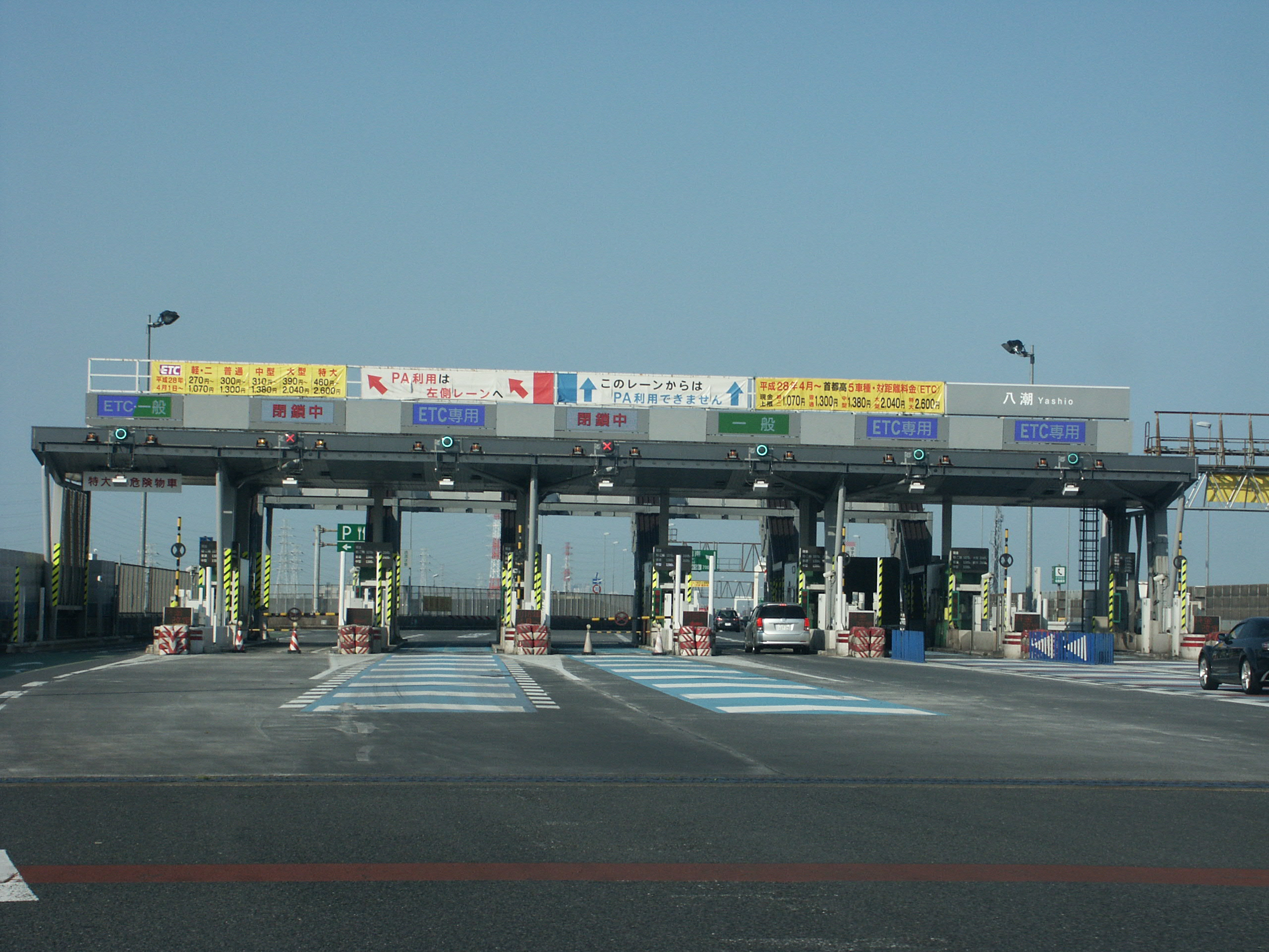 首都高速道路６号三郷線八潮本線料金所